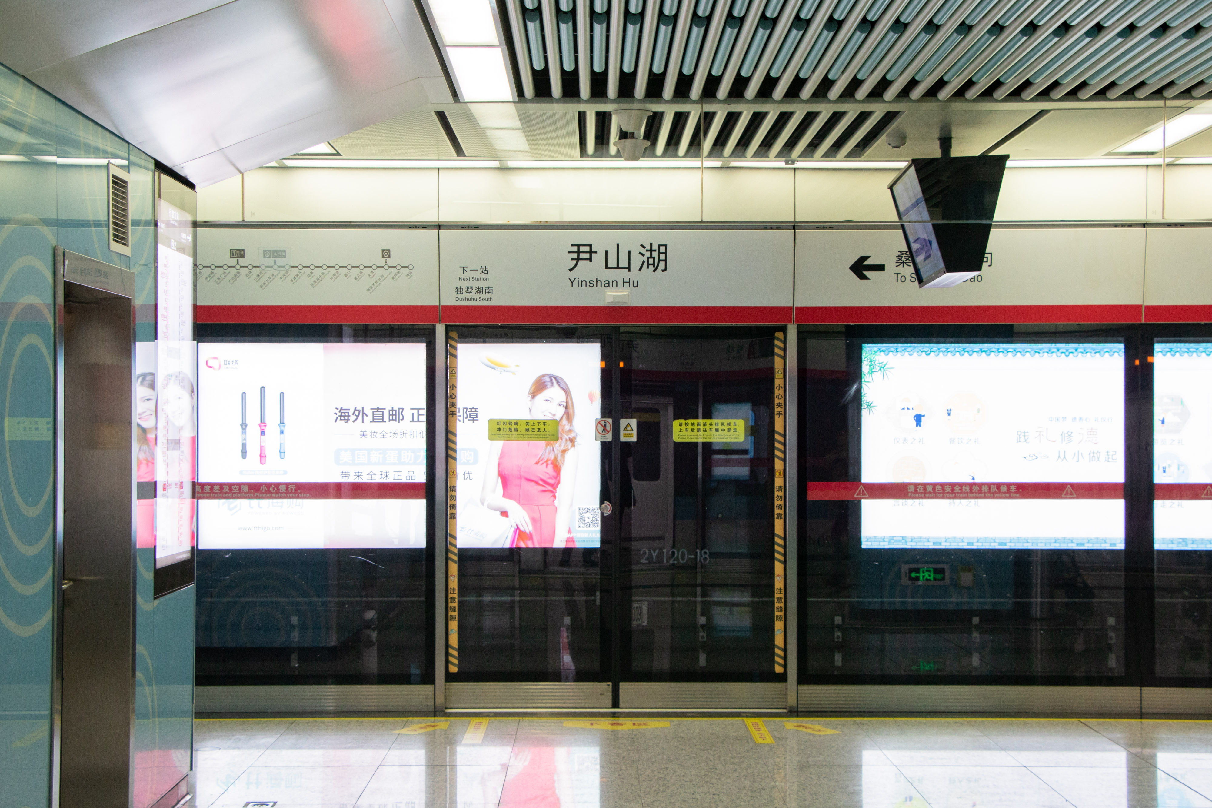 中文（中国大陆）: 尹山湖站站台屏蔽门